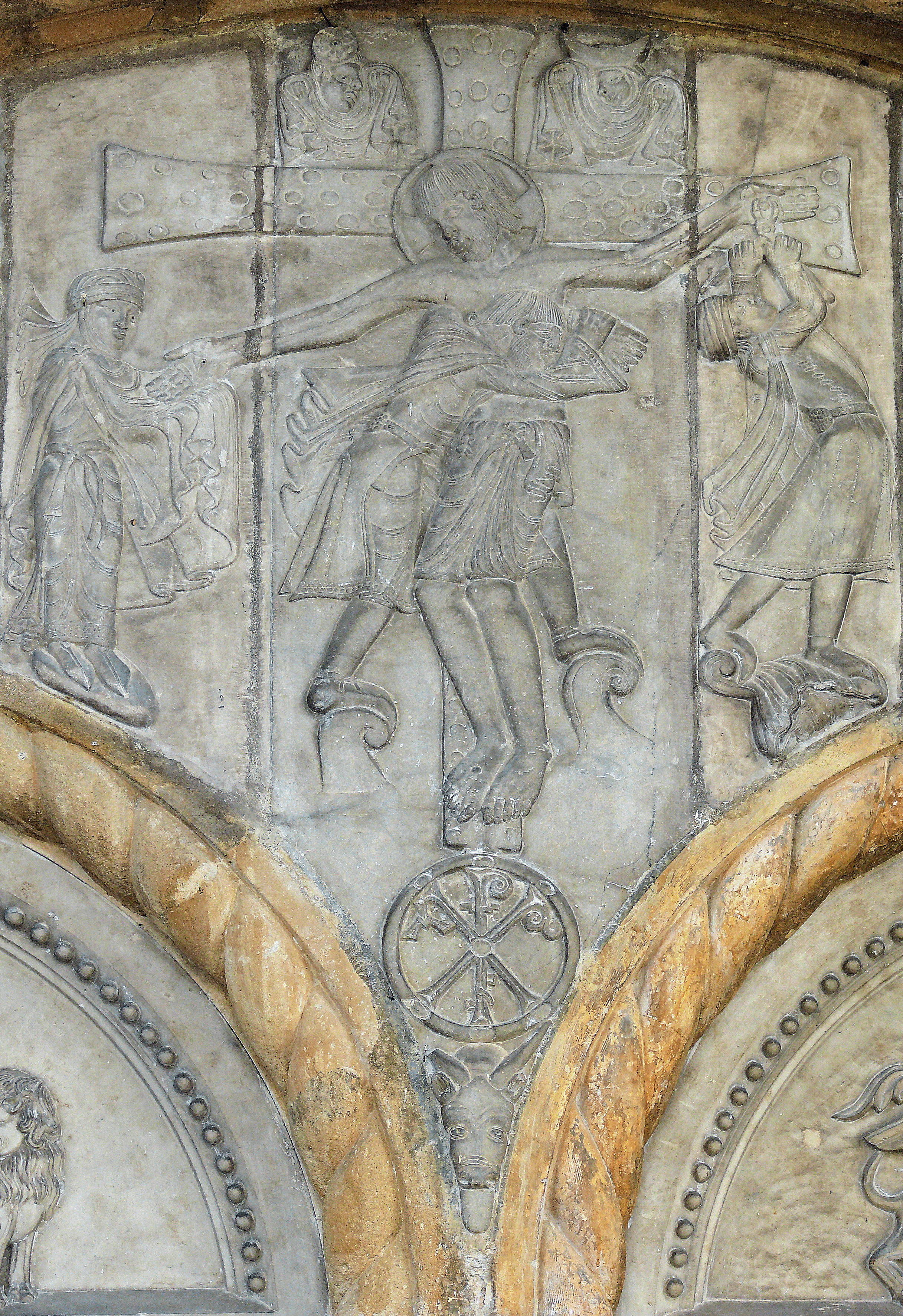 Oloron-Sainte-Marie- Cathédrale Sainte-Marie - Portail : tympan, Crucifixion